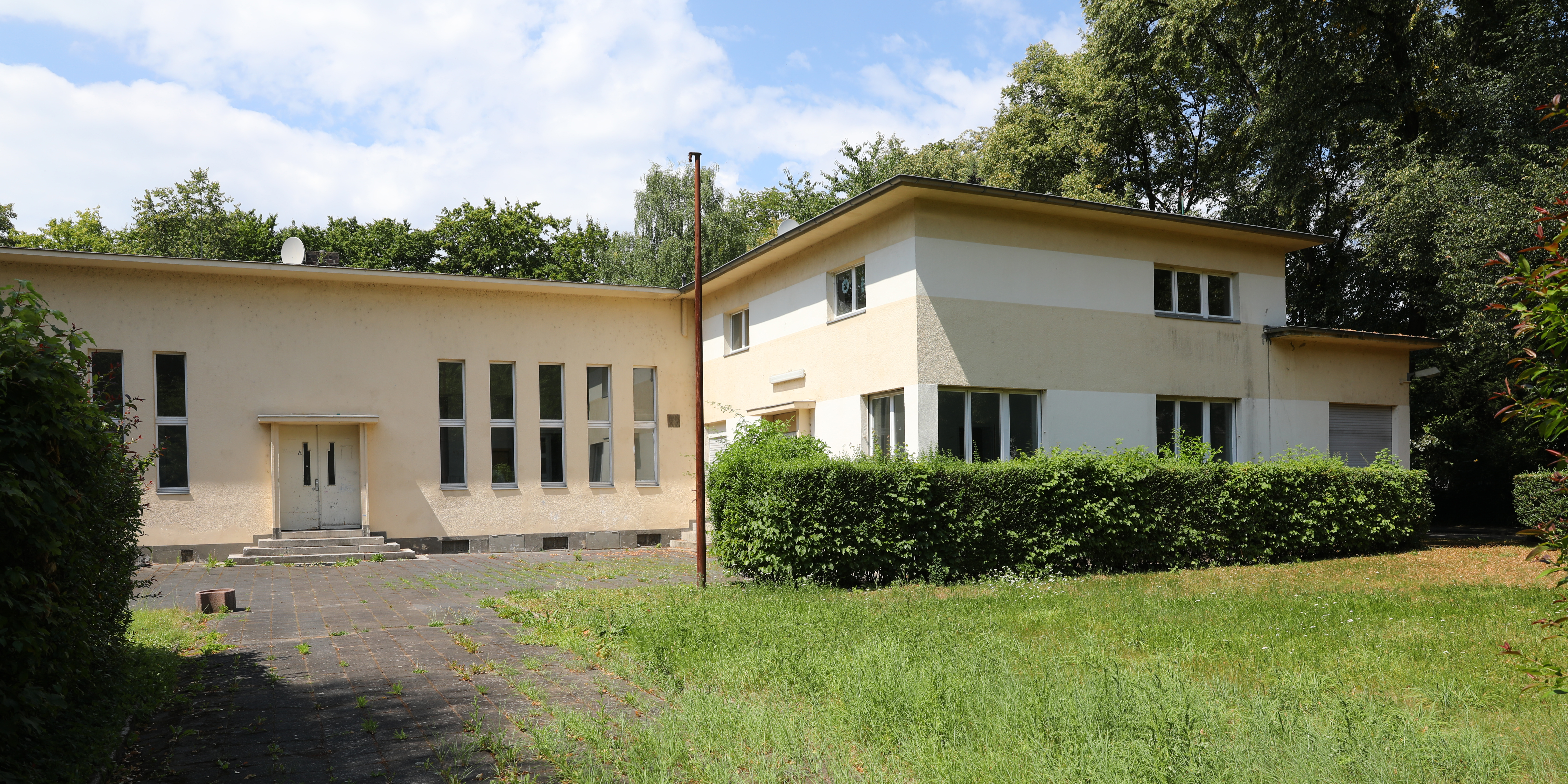 Ehemaliges Funkhaus der WERAG (Vorläufergesellschaft des WDR), Köln-Raderthal Hitzelerstraße 125, Englische Siedlung This is a photograph of an architectural monument.